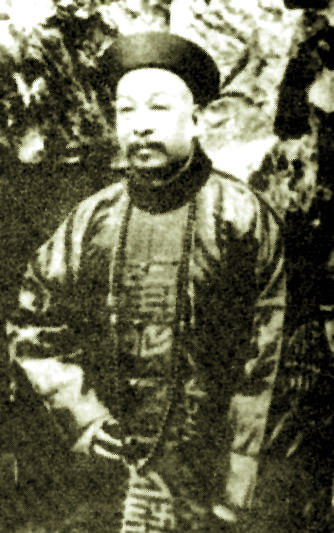 张百熙（1847年－1907年），清末大臣。湖南长沙人。